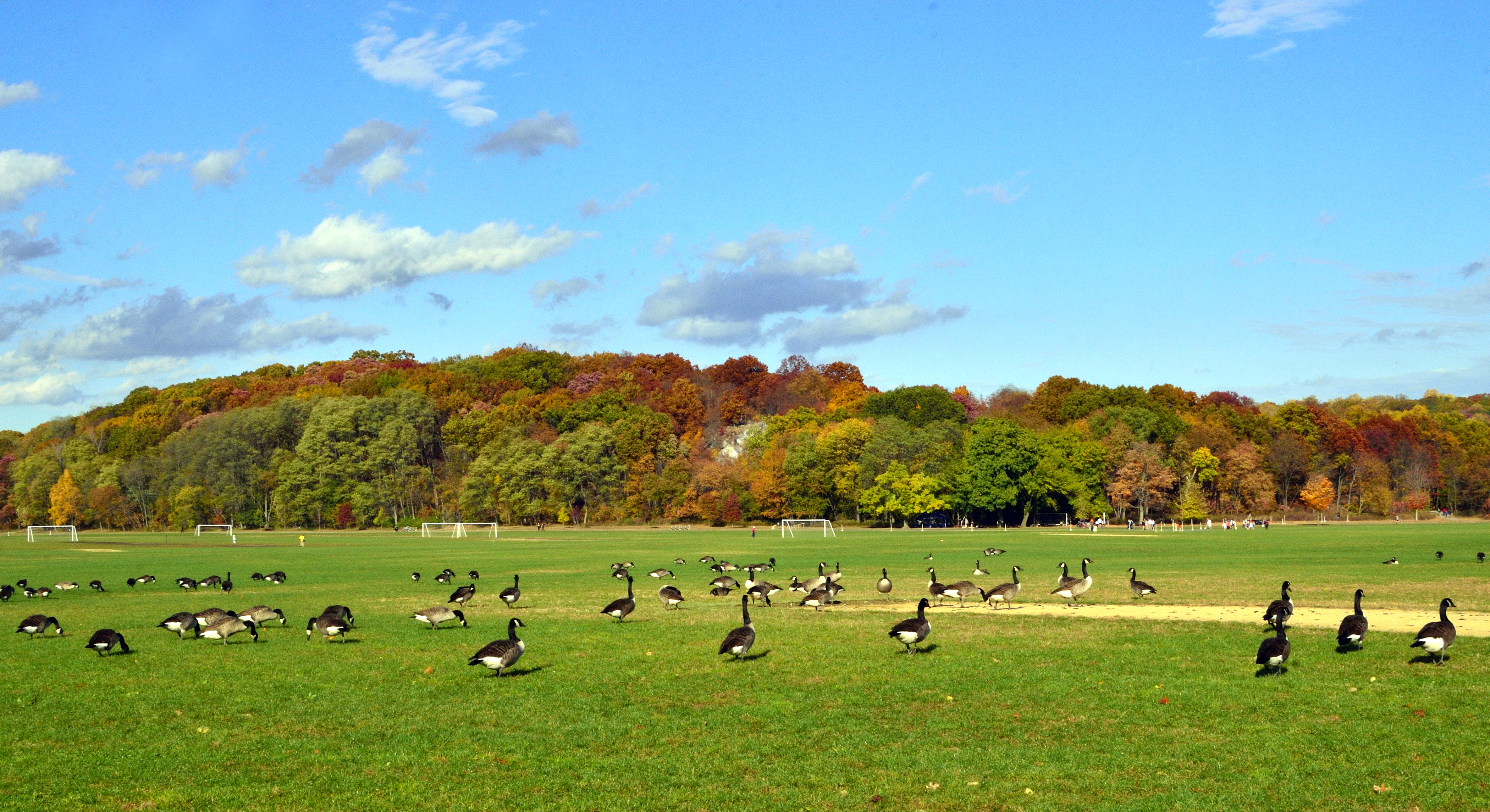 November 1, 2013 Van Cortlandt Park Bronx, NY